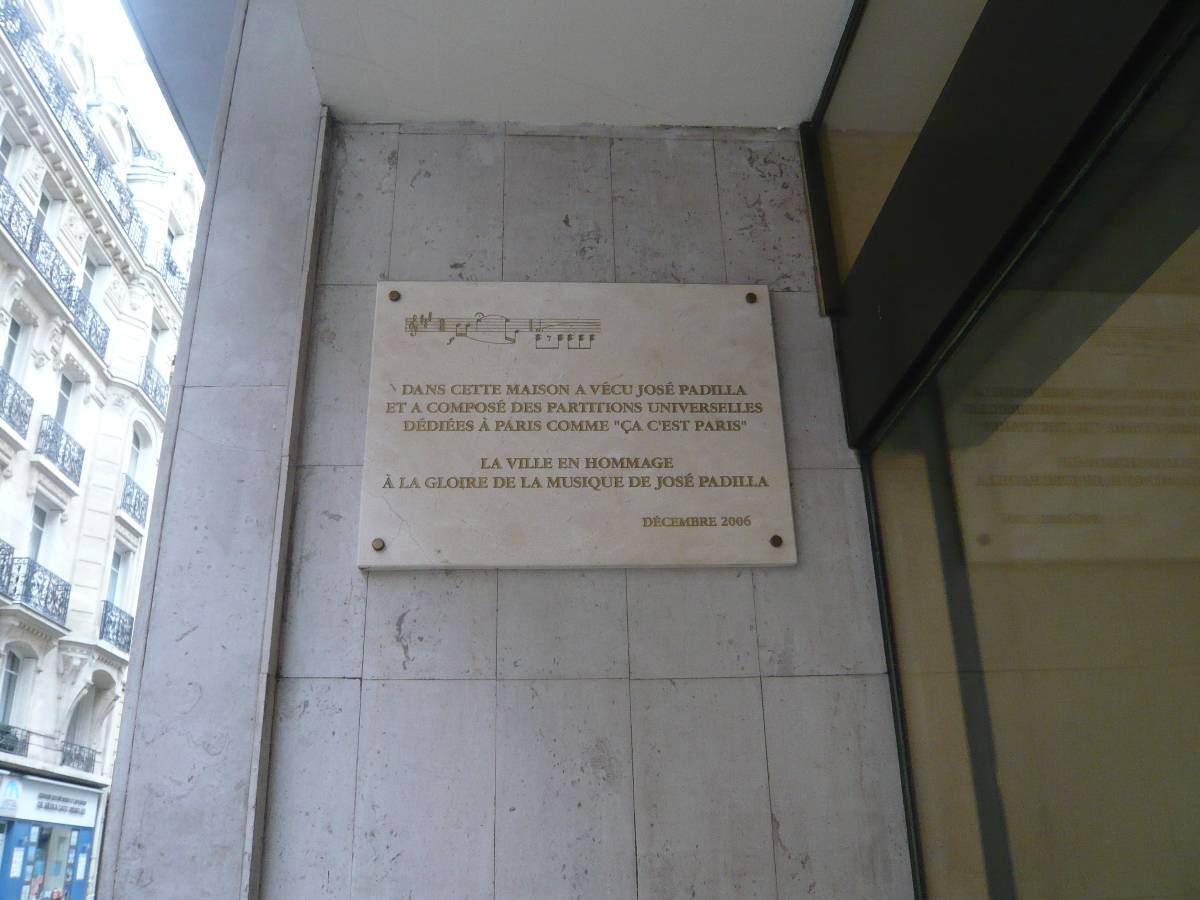 Plaque commémorative au 10, rue Pergolèse Paris pour José Padilla Sanchez, compositeur espagnol (1889-1960)